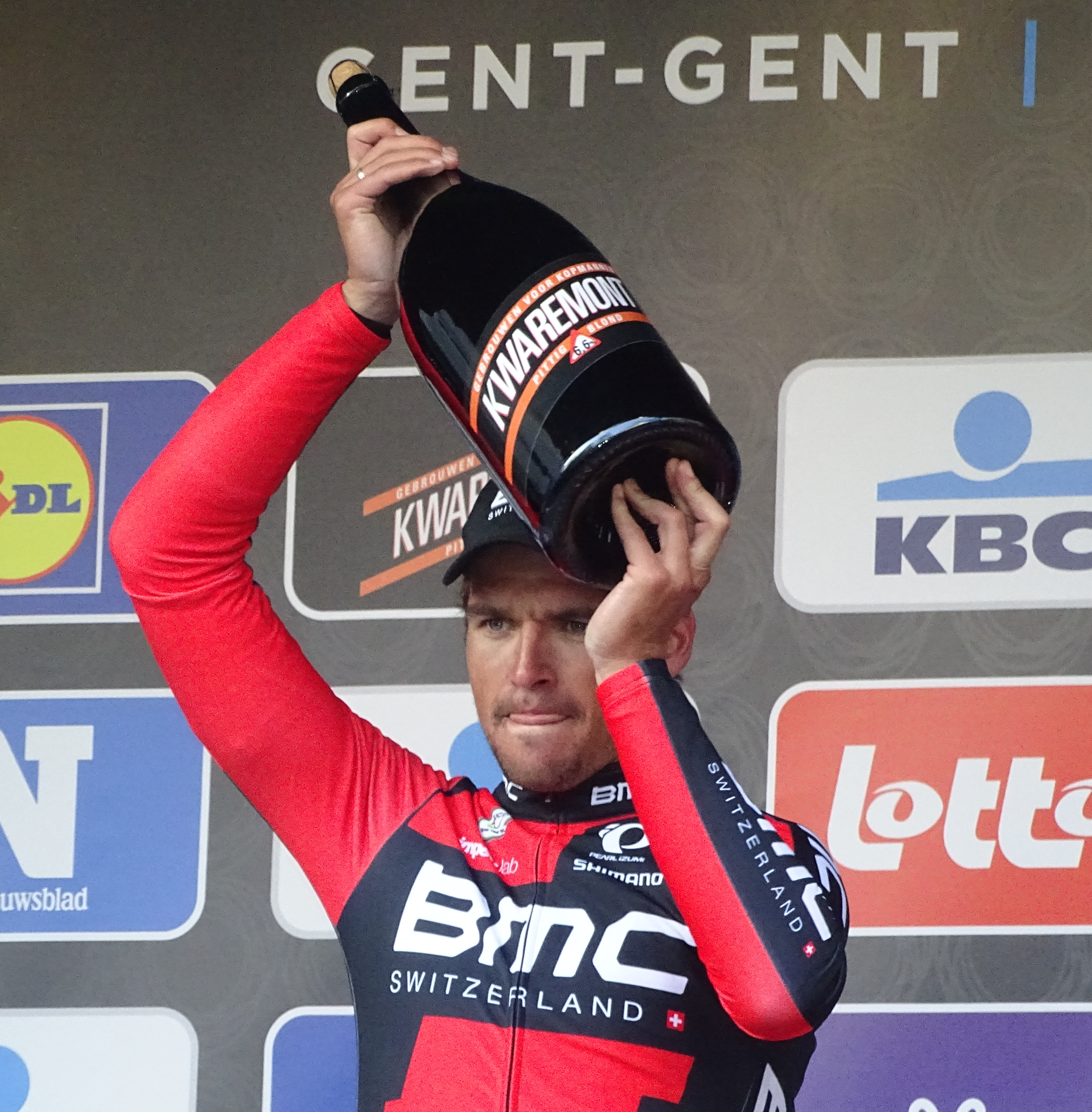 Reportage réalisé le samedi 27 février à l'occasion du départ et de l'arrivée du Circuit Het Nieuwsblad 2016 et de l'arrivée du Circuit Het Nieuwsblad féminin 2016 à Gand, Belgique.